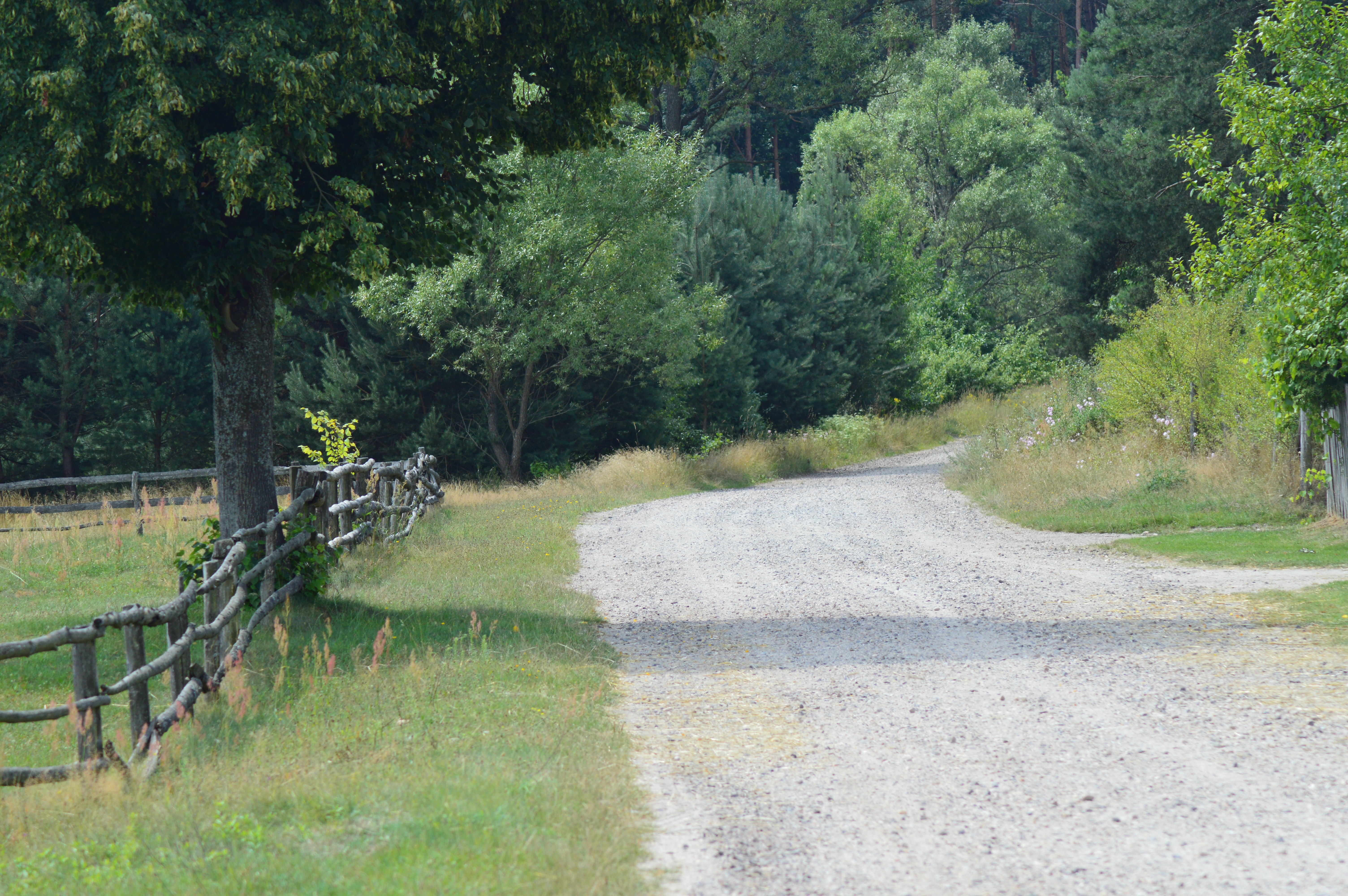 Biały Ług - droga